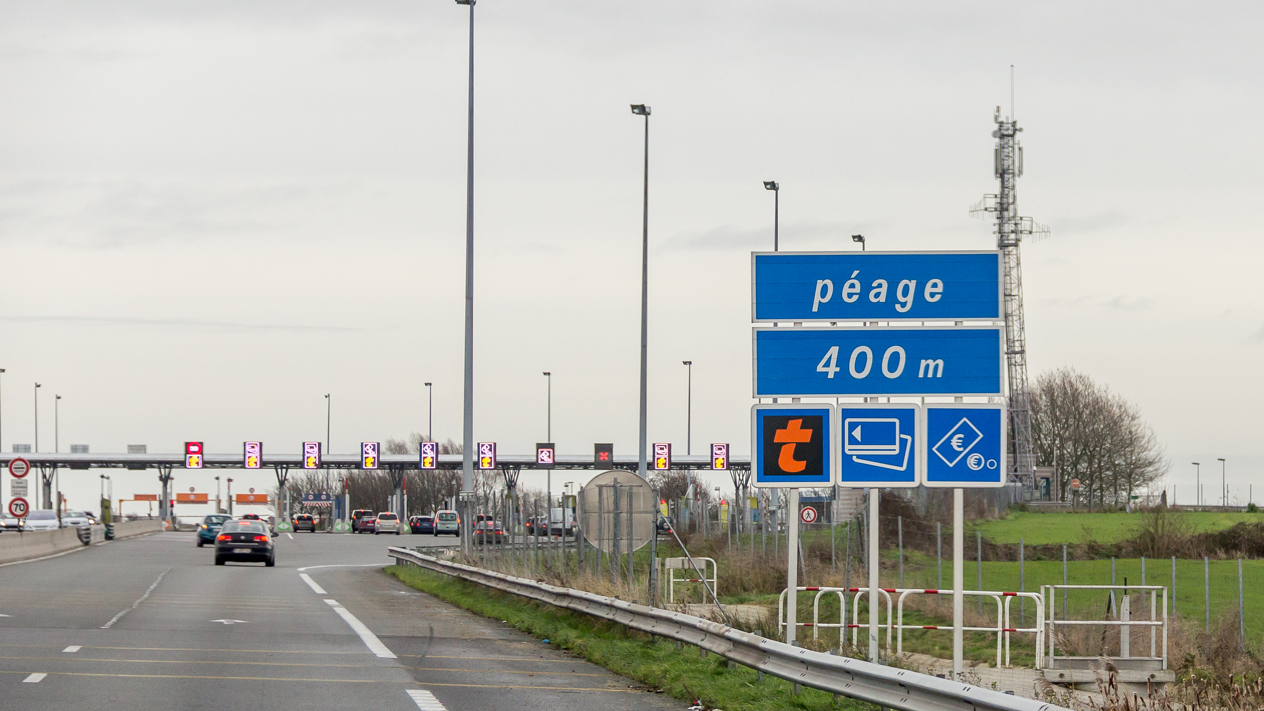 Autoroute A2 - Barrière de péage de Hordain